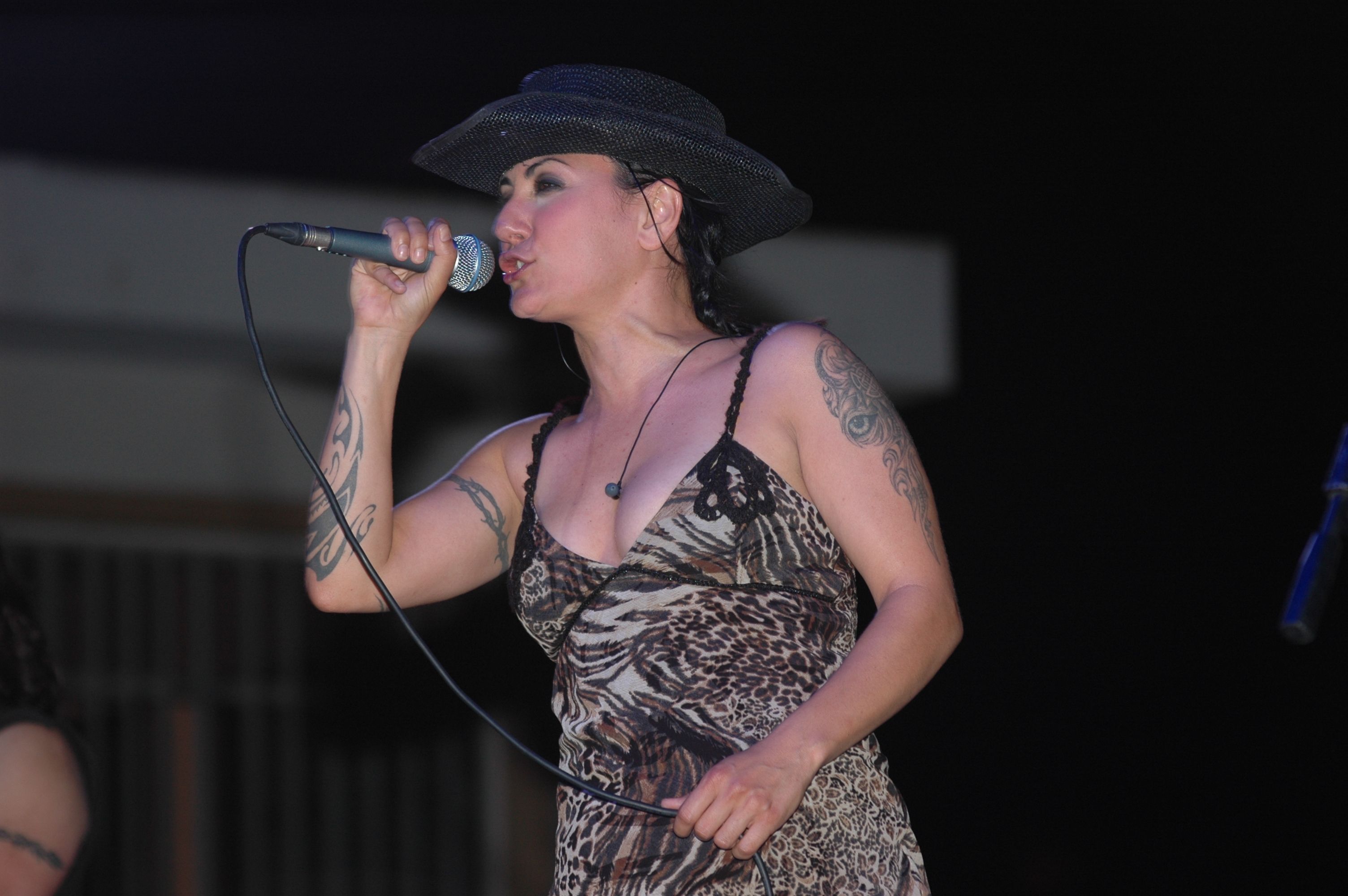 Özlem Tekin, Turkish singer